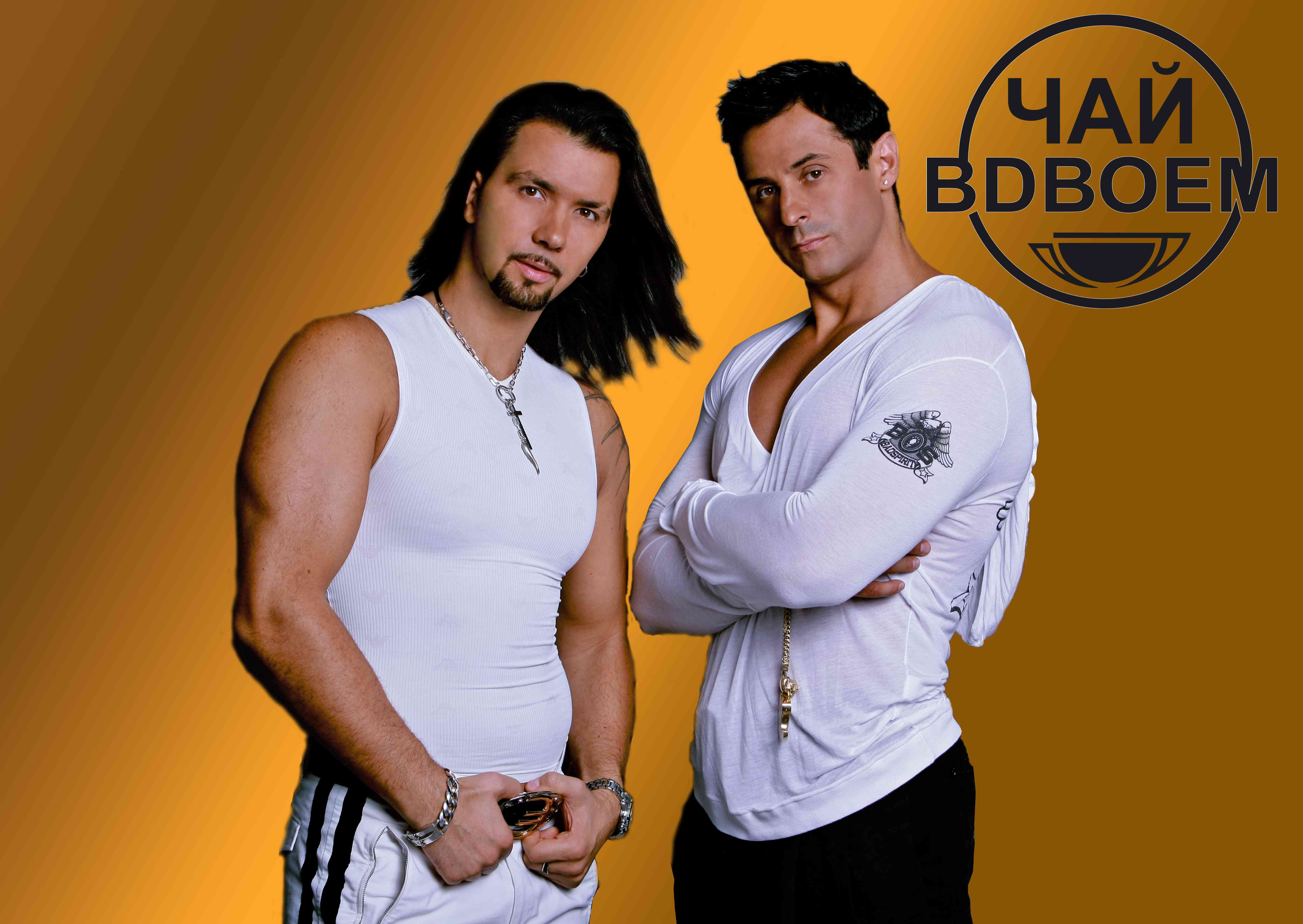 Чай вдвоем